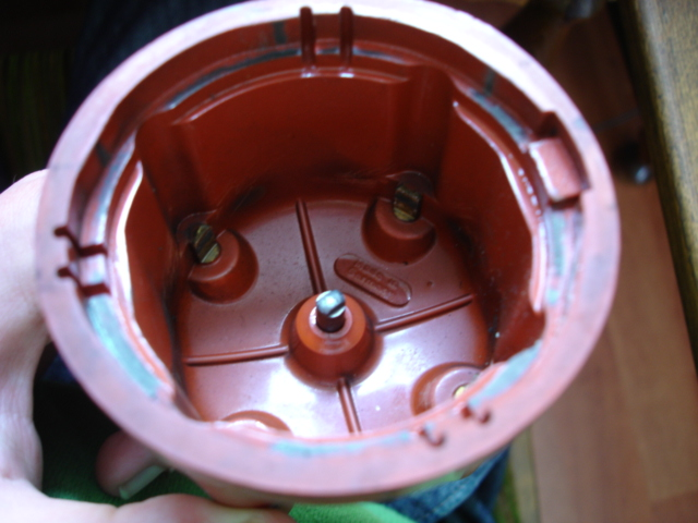 Fordeler: Gammelt fordelerlokk. Det kan sees at kontaktpunktene er slitte. Lokket settes over en rotor som roterer med halvparten av motorens hastighet, slik at det blir kontakt fra det midtre punktet, som er koblet til tennspolen, til de fire kontaktpunktene i ytterkanten av lokket, som er koblet til hver sin tennplugg. Rotoren har ikke direkte kontakt med de yttre kontaktpunktene, men siden spenningen i dette systemet er så høy kan strømmen hoppe den lille avstanden.